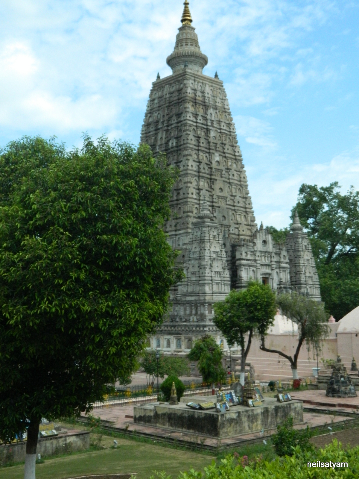 Mahabodhi Temple